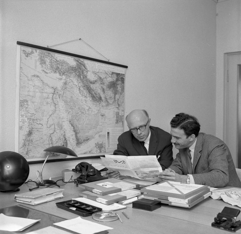 Arabische Rundfunkredaktion der Deutschen Welle in Köln